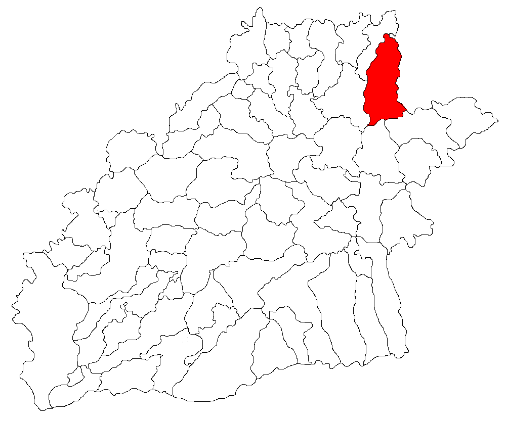 Categorie:Hărţi ale judeţului Sibiu